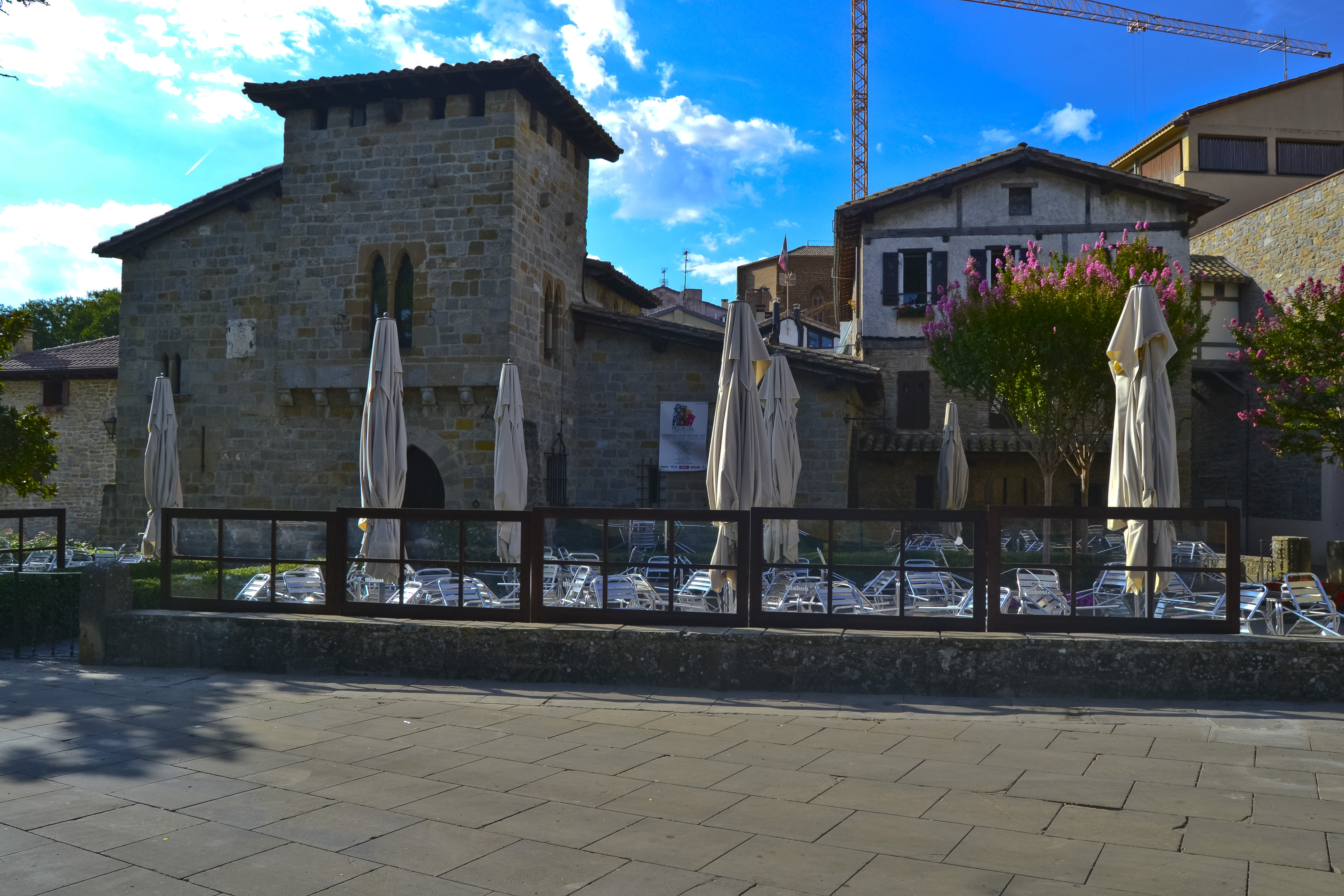 Zaldi Zuria ostatua. Iruñea. Nafarroa, Euskal Herria. Caballo Blanco Tavern. Pamplona. Navarre, Basque Country.